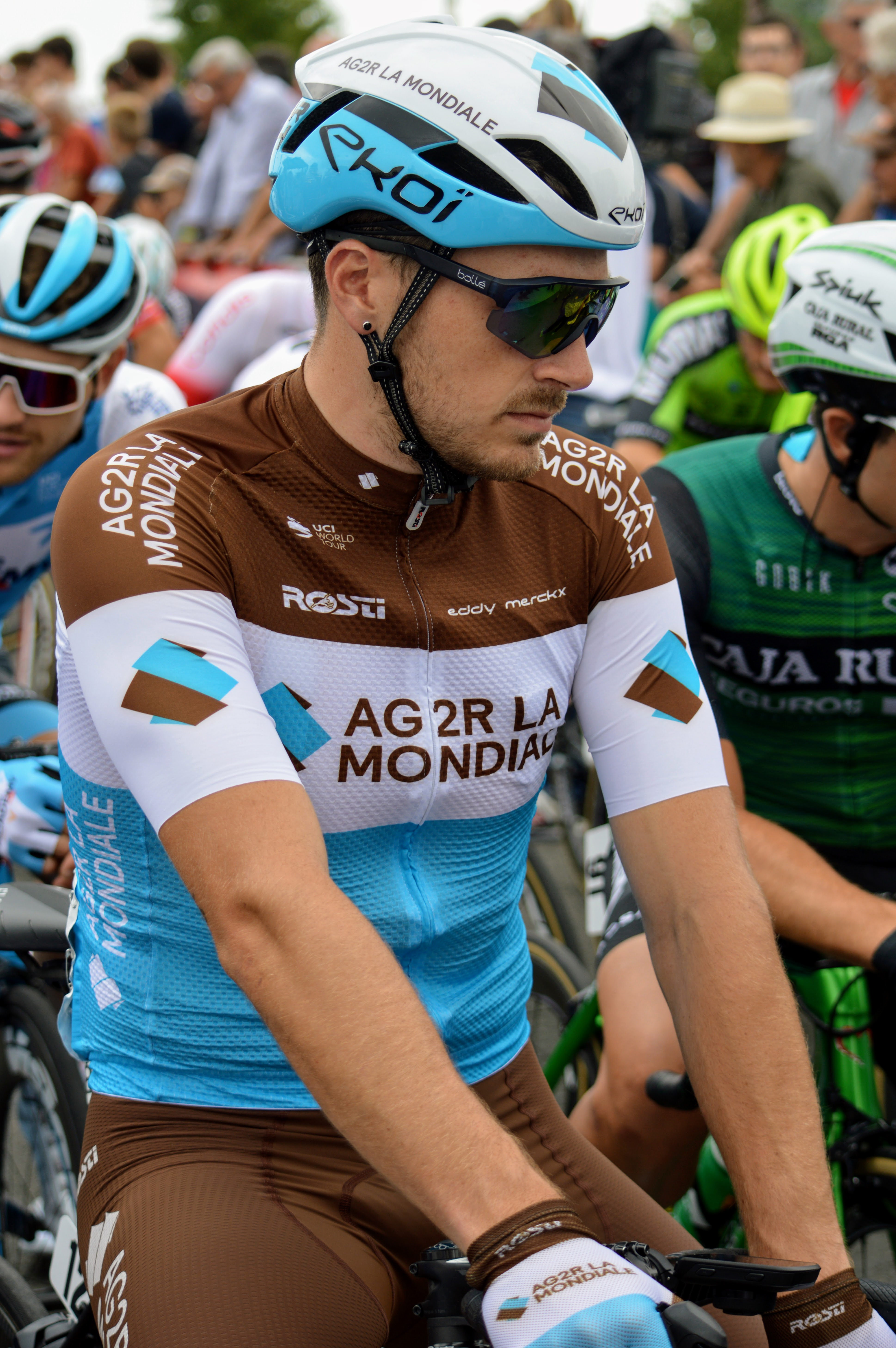 Alexis GOUGEARD - Août 2019